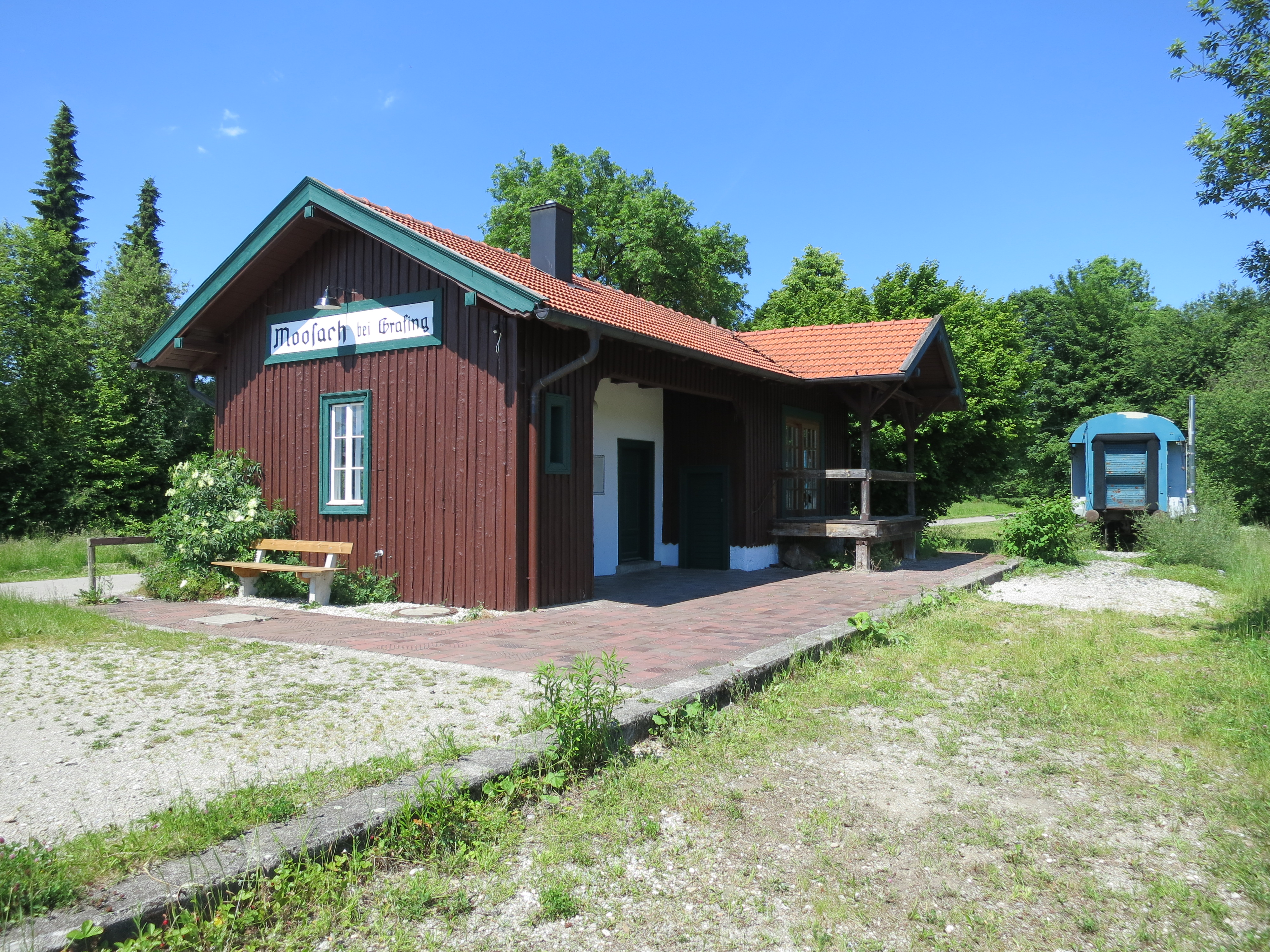 Denkmalgeschütztes Empfangsgebäude des stillgelegten Bahnhofs Moosach (b. Grafing) an der Lokalbahn Grafing–Glonn von der Gleisseite mit einem ehemaligen Personenwagen. Darstellung des Bhf. Moosach mit dem Anschlußgleis der Waldbach-Mühle/Sägewerk in der Topogr. Karte 1:25.000 von 1941 auf BayernAtlas